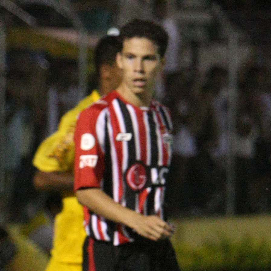 O jogador de futebol Hernanes, Anderson Hernanes de Carvalho Andrade Lima, pelo São Paulo FC.